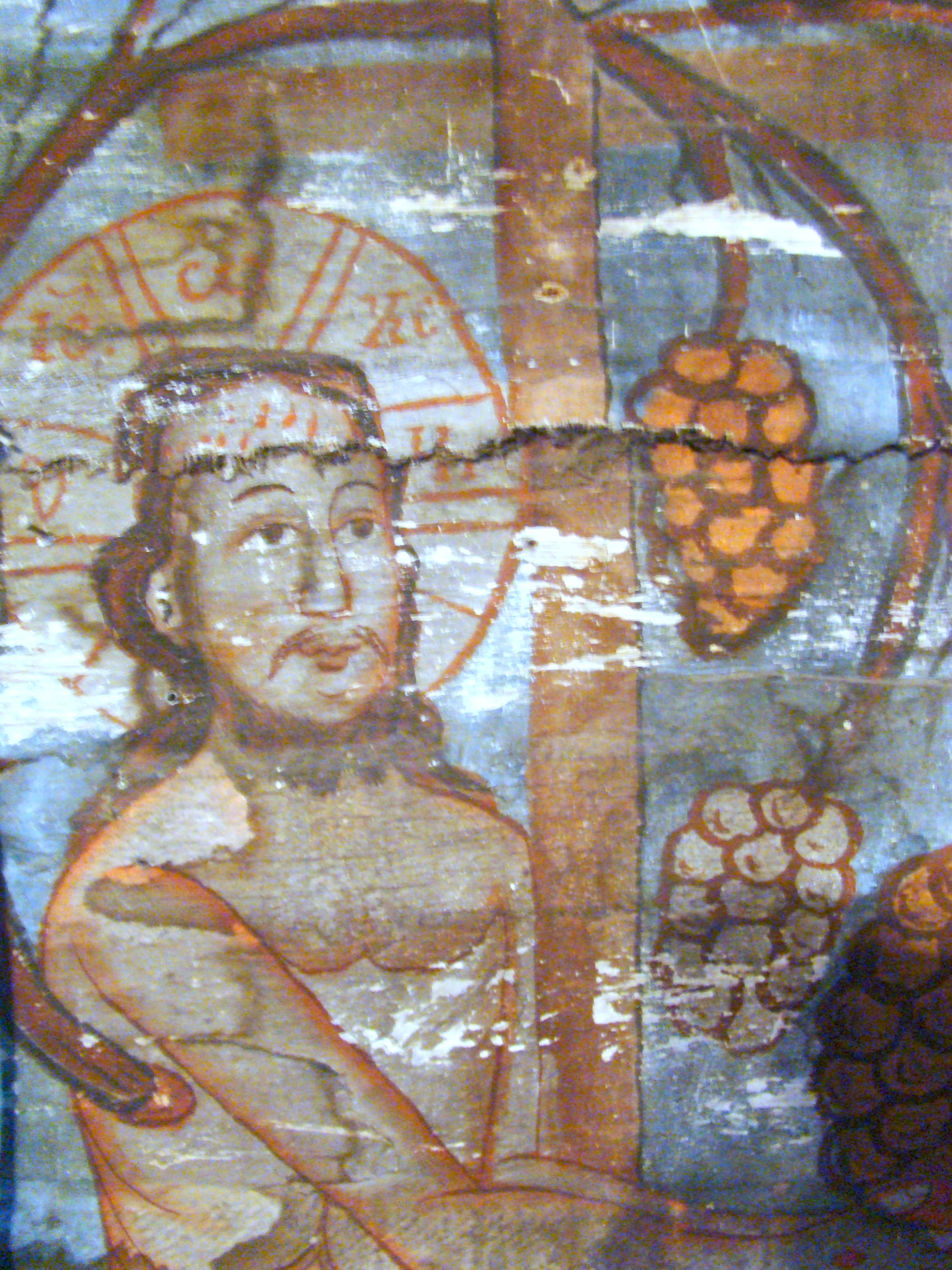 Iconografia Sfintei Euharistii: Iisus vița-de-vie. Biserica de lemn din Purcăreț, comuna Letca, județul Sălaj